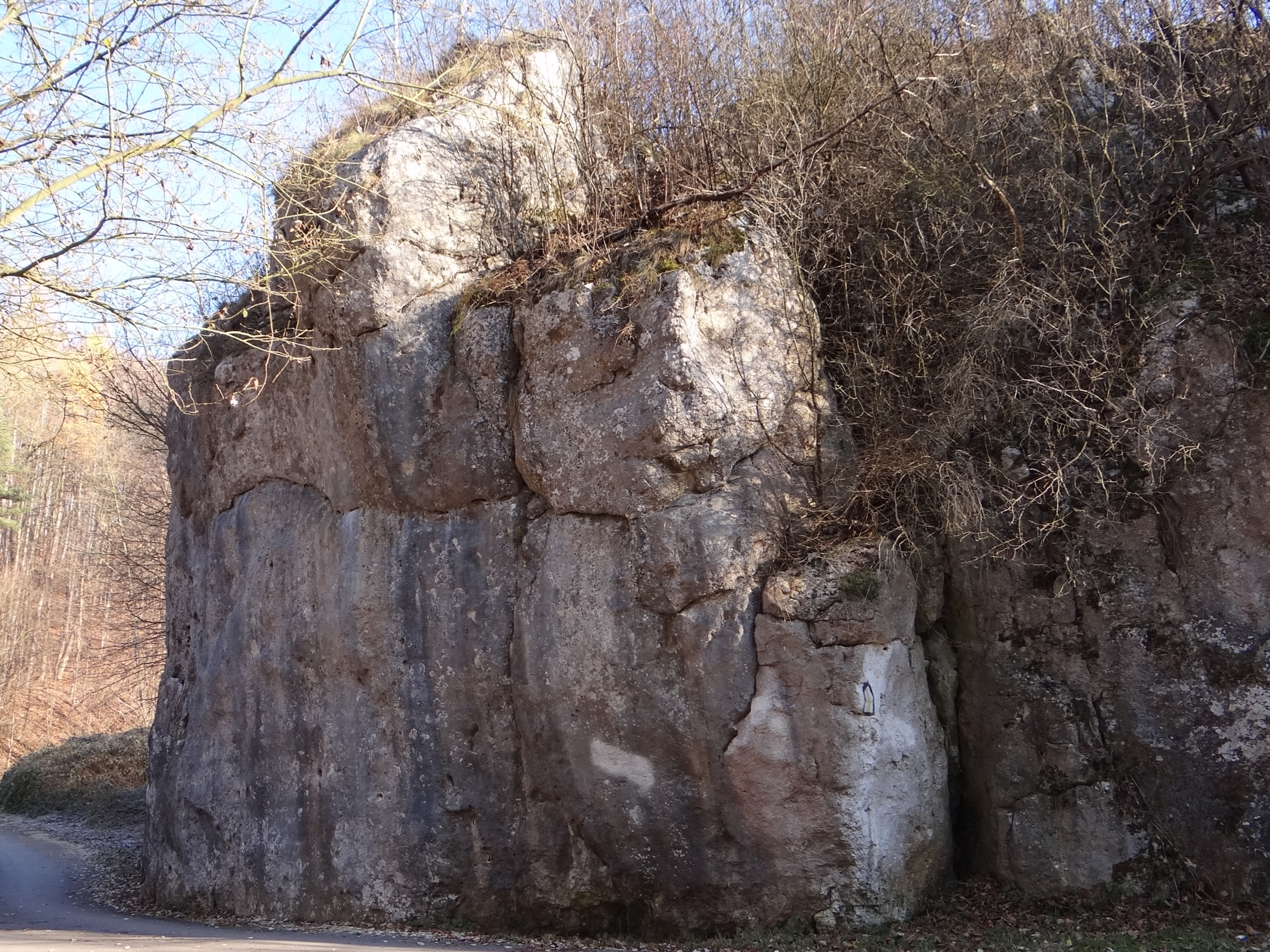 Przydrożne Skały w Dolinie Kobylańskiej. Skała 2